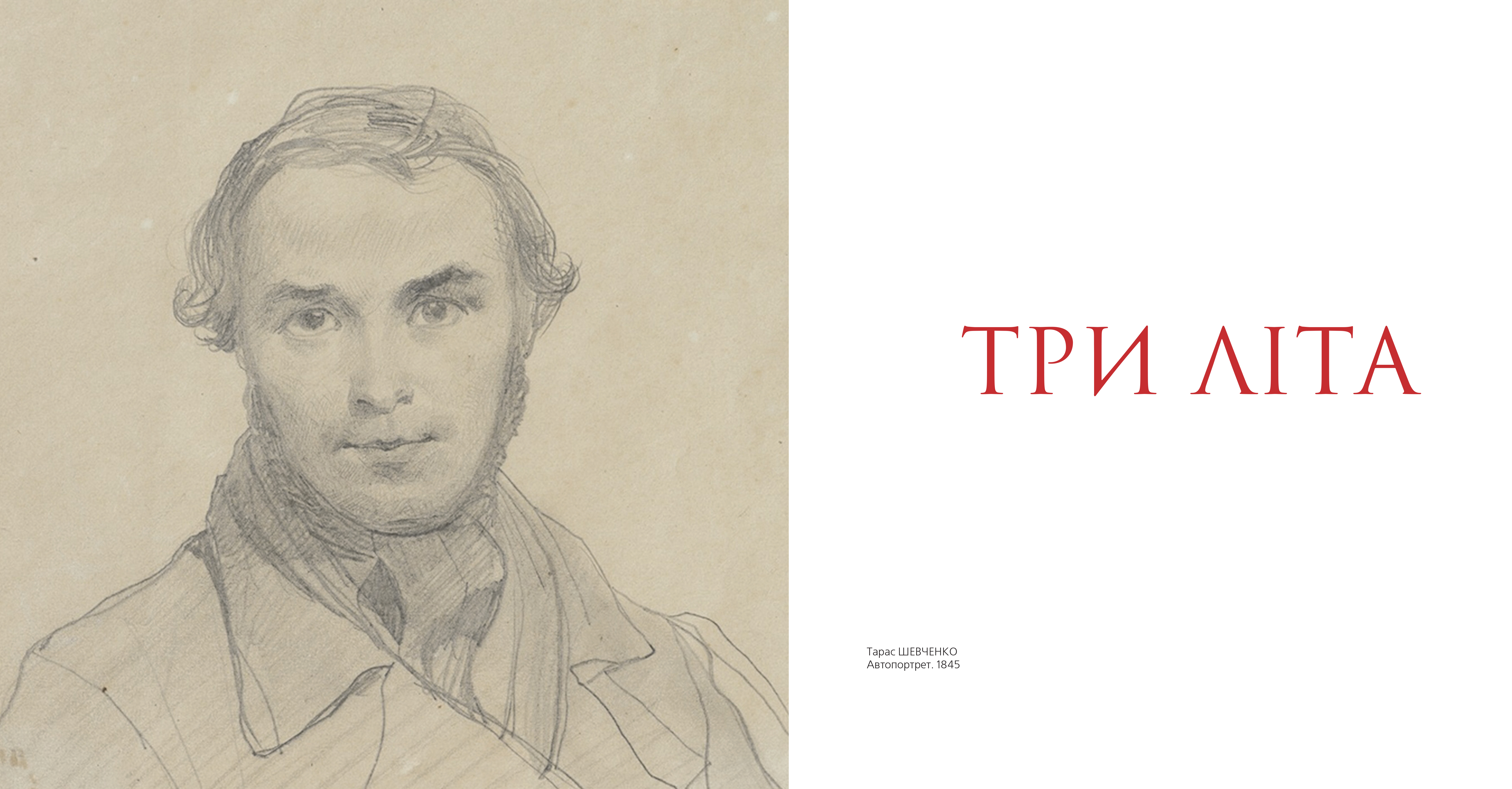 Титульна сторінка книги Шевченкової книги ТРИ ЛІТА видання 2020 р.